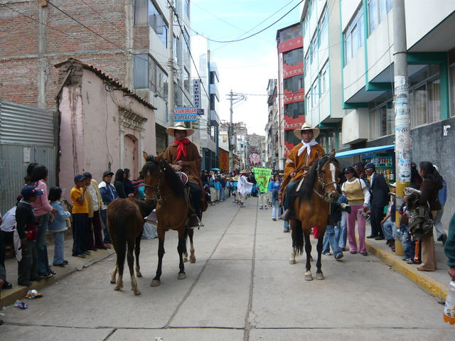 Estudiantes en la entrada de Kapus del Glorioso Colegio Nacional de San Carlos de Puno